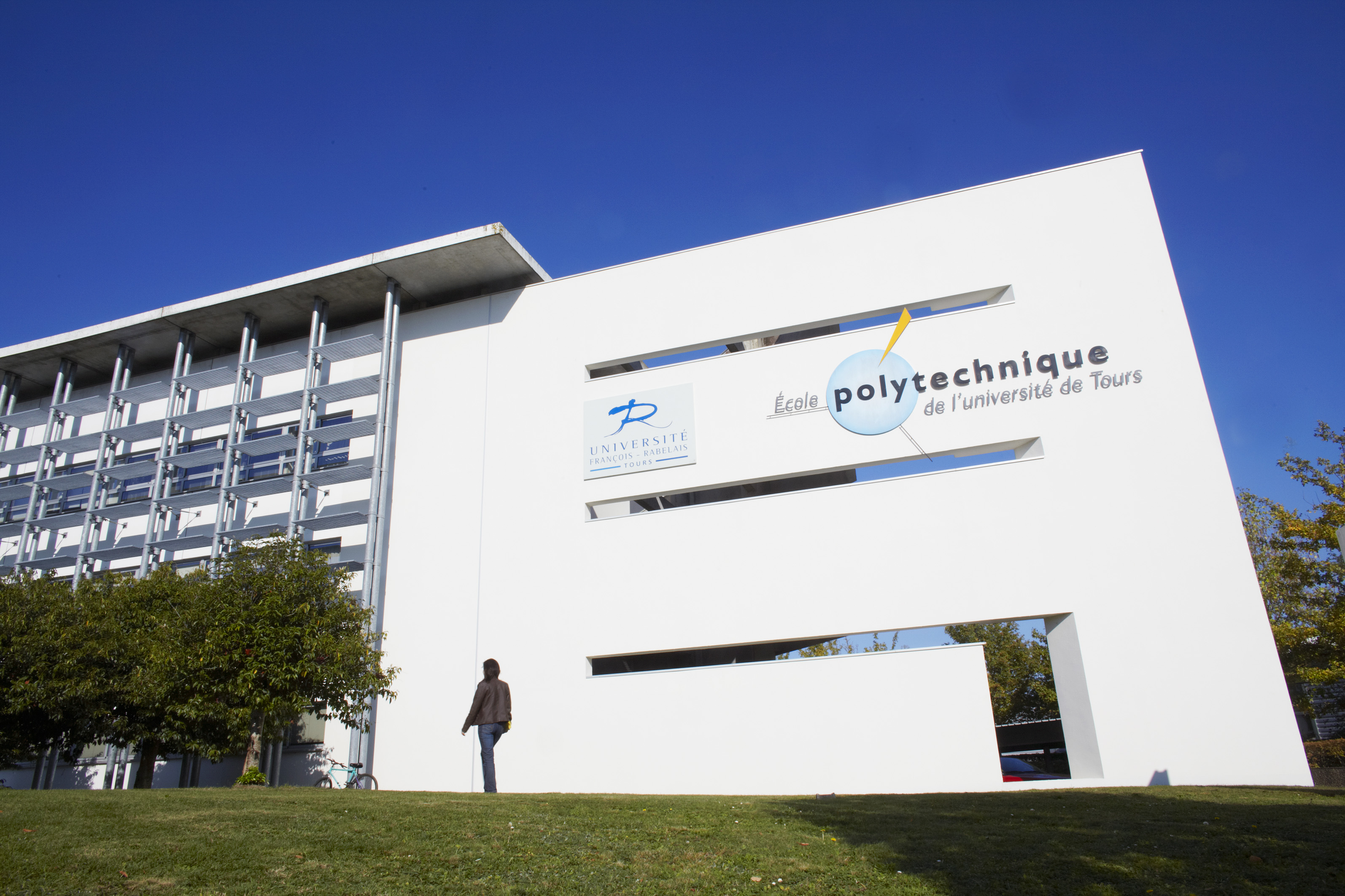 Département informatique de Polytech Tours sur le campus des Deux-Lions